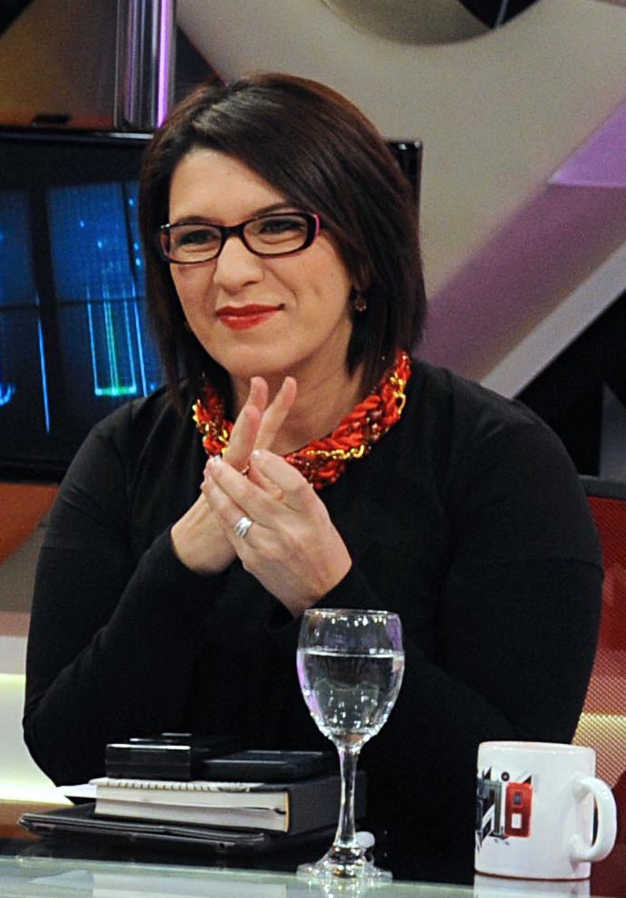 Daniel Scioli en 678